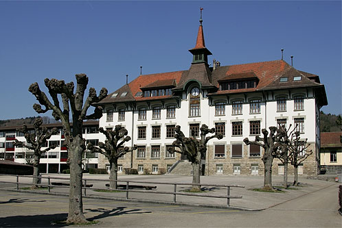 Moudon: Ecole primaire